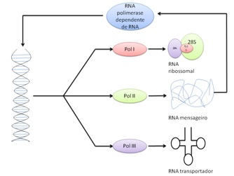 A RNA pol I tem como função sintetizar diferentes RNAs ribossomais, a pol II transcreve RNA mensageiro, ao passo que RNA pol III atua na transcrição de RNA transportador. Em adição podemos citar a ação da RNA polimerase dependente de RNA, que atua na síntese de DNA a partir de um molde de RNA.